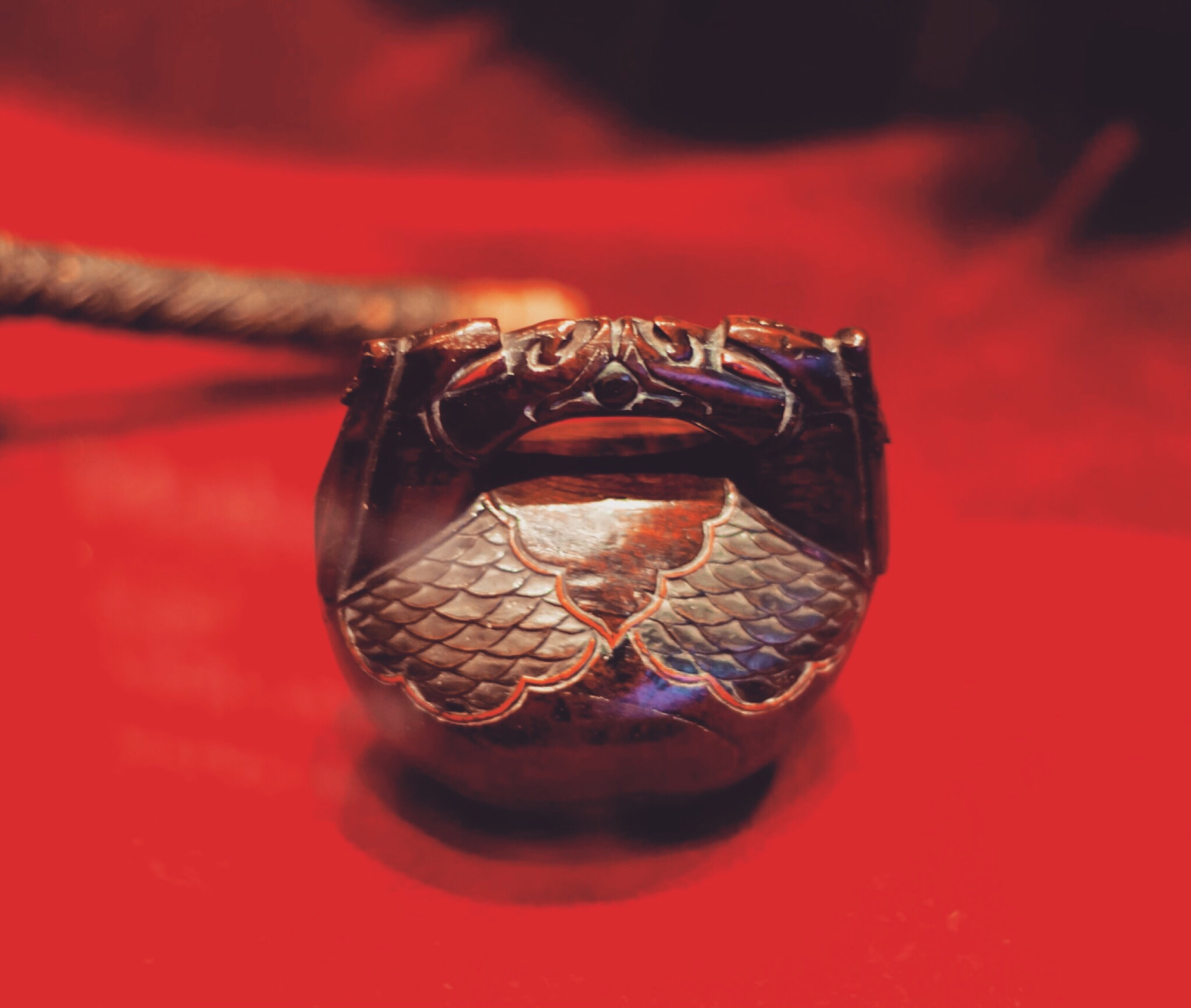 Mokugyo, Japó, fons del Museu de la Música de Barcelona